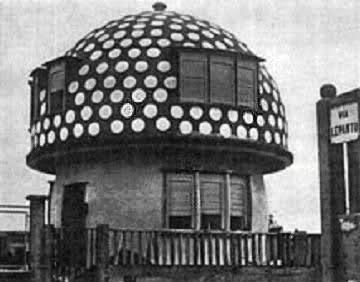 Milano, le demolite case a fungo alla Maggiolina, opera dell'architetto Mario Cavallè